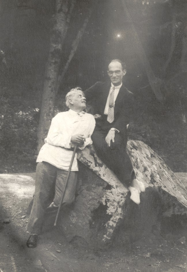 კოტე მარჯანიშვილი და დოდო ანთაძე. კონსტანტინე (კოტე) მარჯანიშვილი - ქართველი რეჟისორი. საქართველოს სსრ სახალხო არტისტი (1931). დოდო ანთაძე - ქართველი რეჟისორი, თეატრალური მოღვაწე,კოტე მარჯანიშვილის მოწაფე, სსრკ სახალხო არტისტი (1971). ორიგინალის ზომა: 140x87.